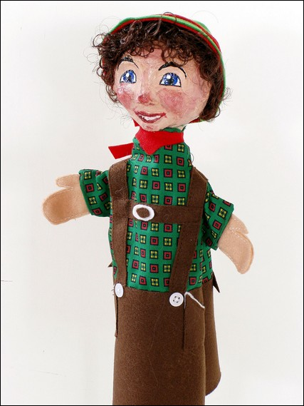 Handpuppenfigur Seppl